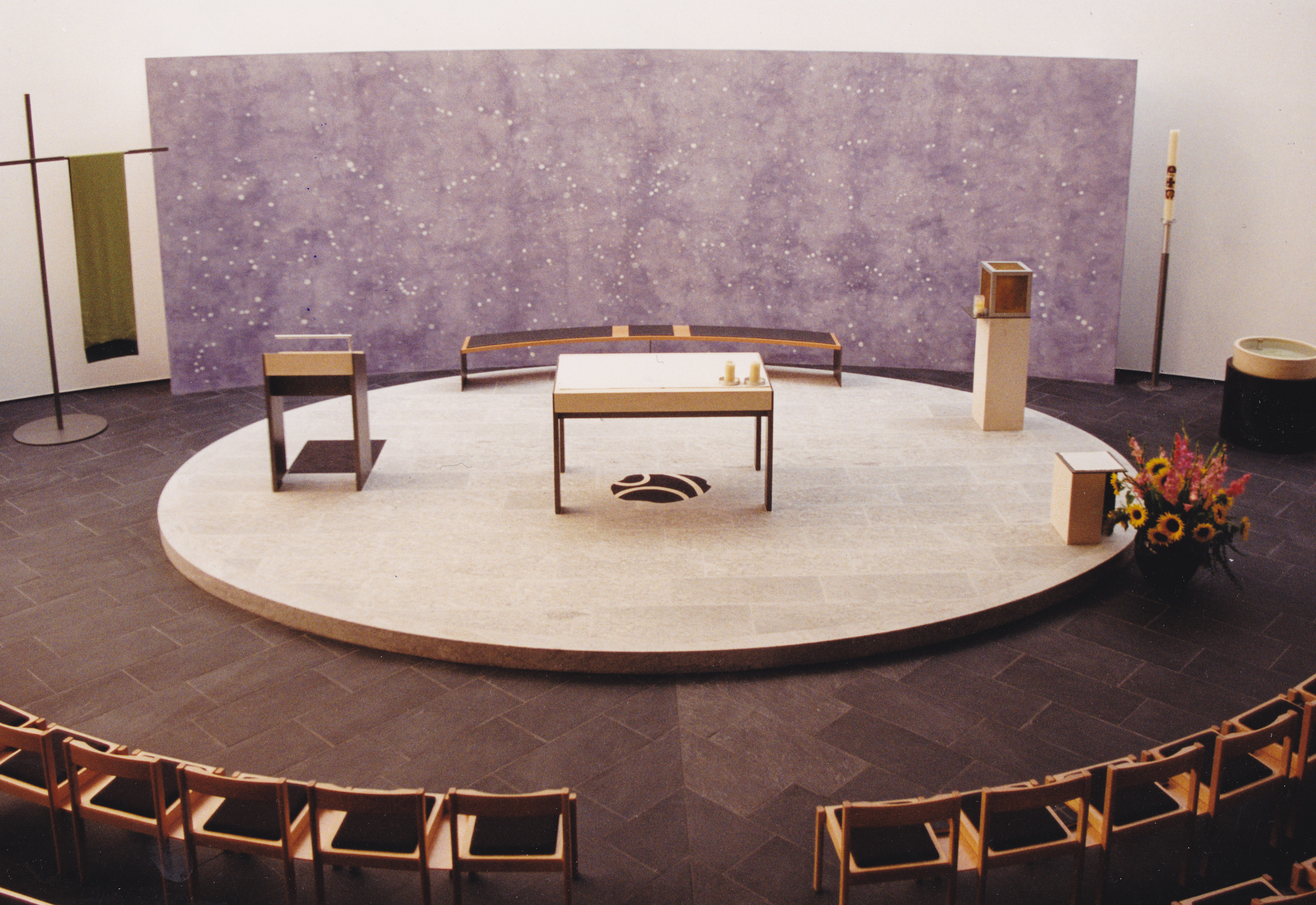 Römisch-katholische Pfarrkirche Hl. Dreifaltigkeit Zollikon, Altarinsel Ellipse